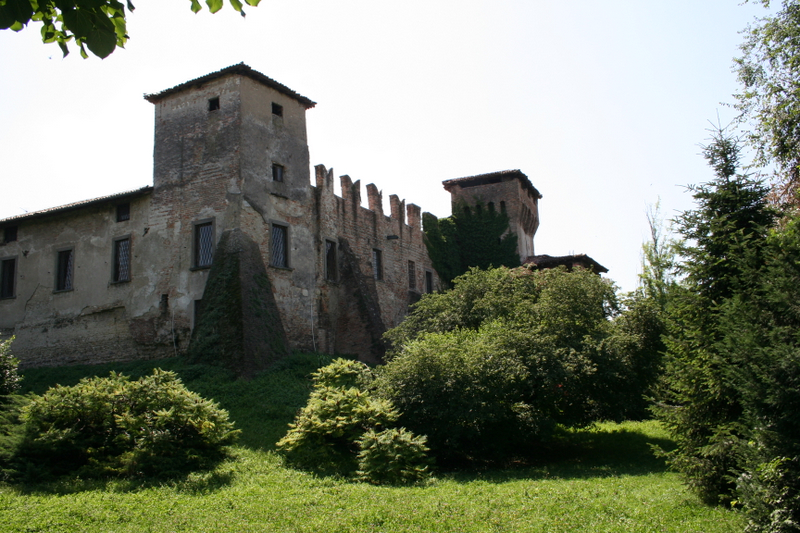 Romano di Lombardia (Bg), il castello.